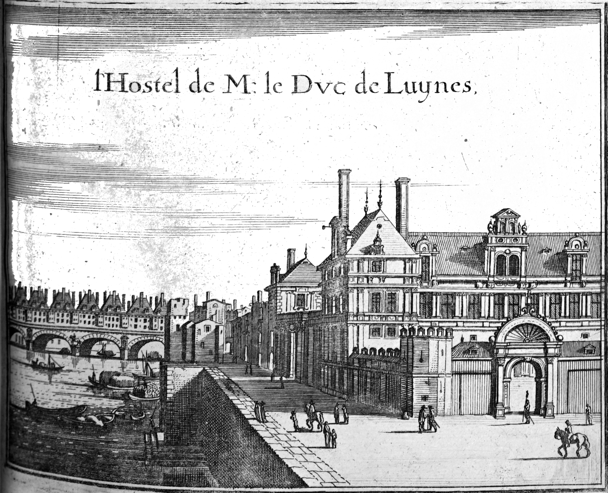 image provenant de Topographiae Galliae.